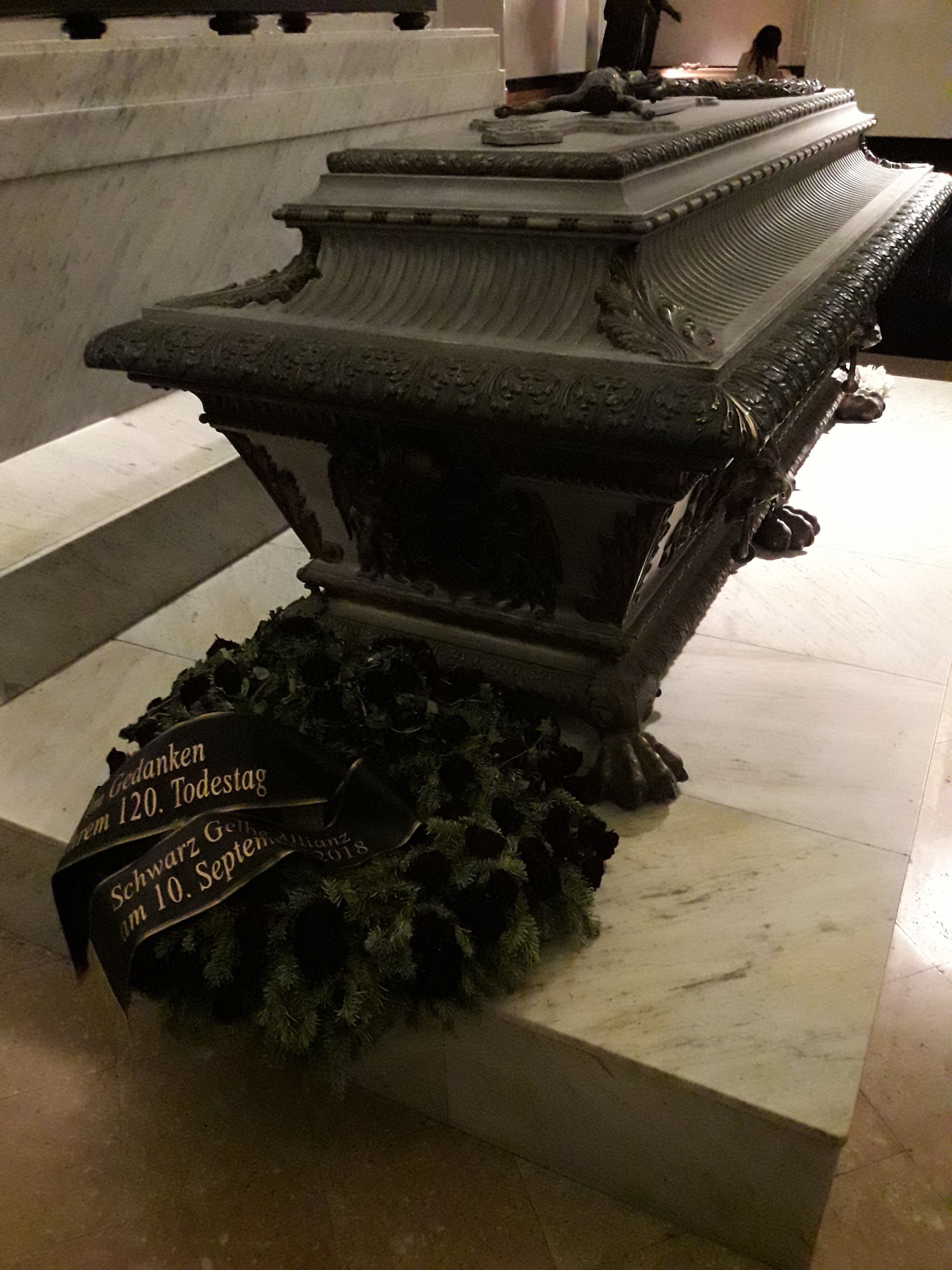 Couronne déposée le 10 septembre 2018 par le parti monarchiste autrichien Schwarz-Gelbe Allianz devant la tombe de "Sissi", en commémoration du 120e anniversaire de la mort de l'impératrice.